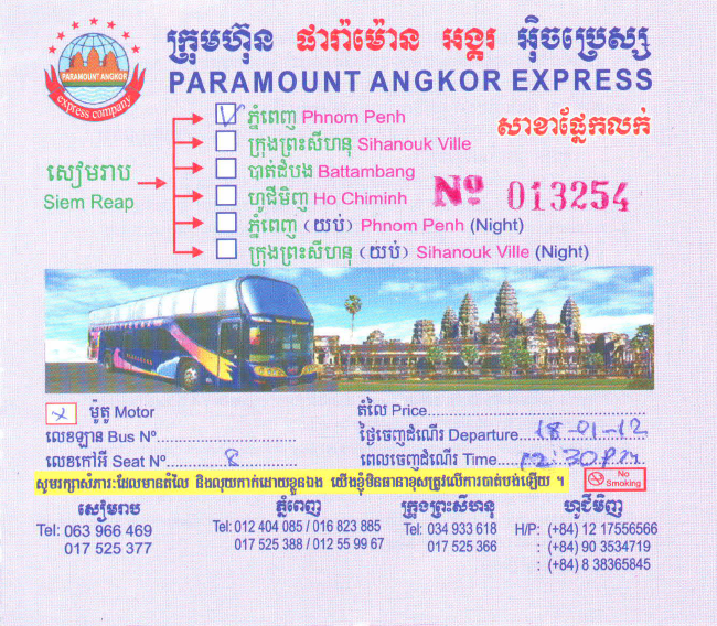 Busfahrkarte Siem Reap - Phnom Penh (2012)